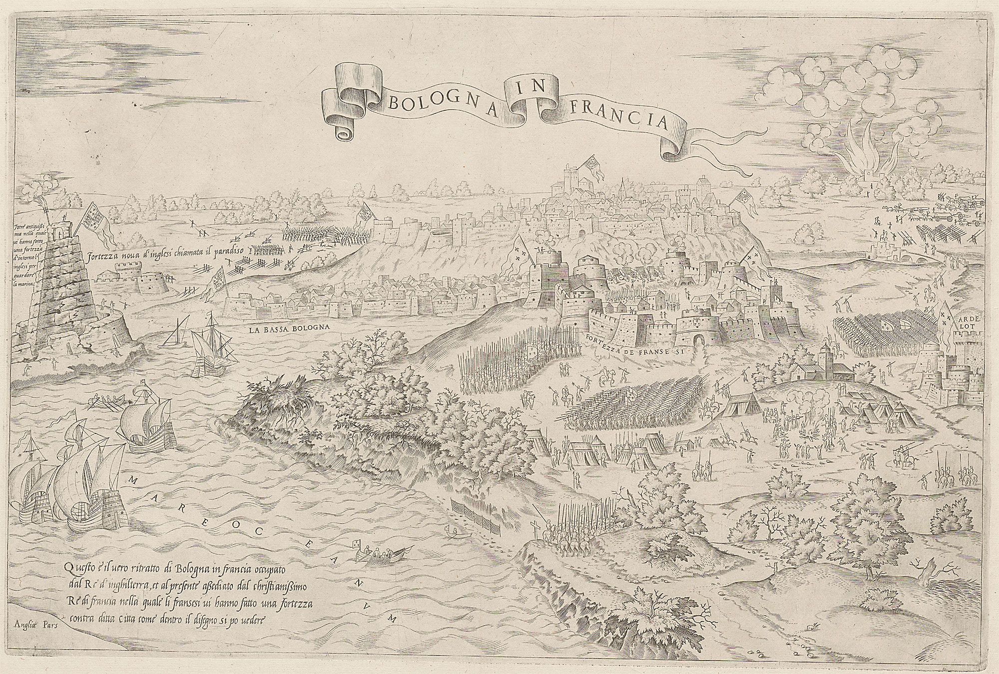 Bologna in Francia (Belagerung von Boulogne durch die Engländer); Kupferstich, 1550